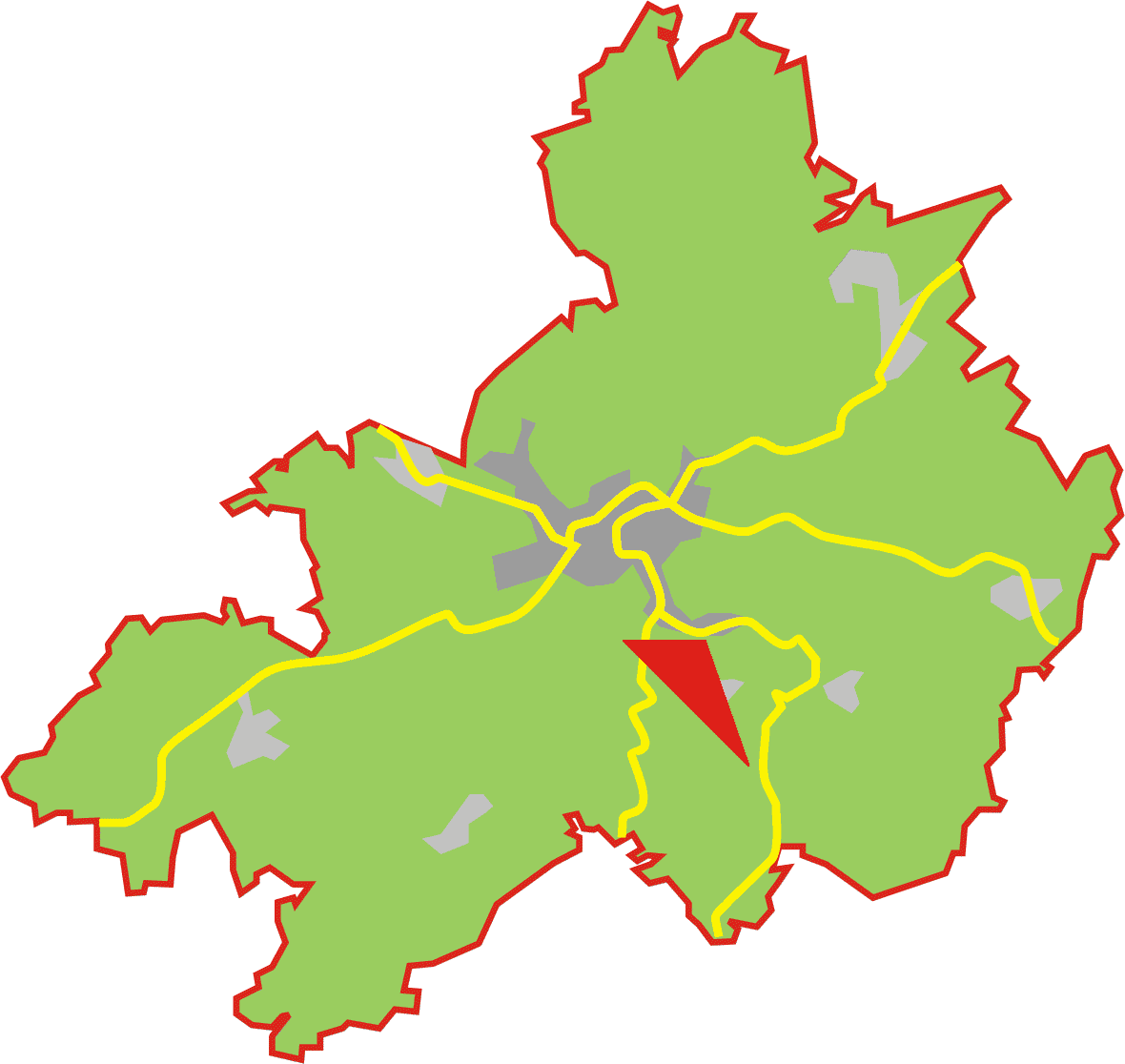 Pos neeskotten